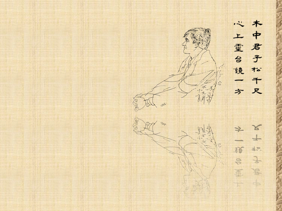 中文（香港）: 黃永玉為李怡所繪的速寫暨張佛千所撰的嵌名聯